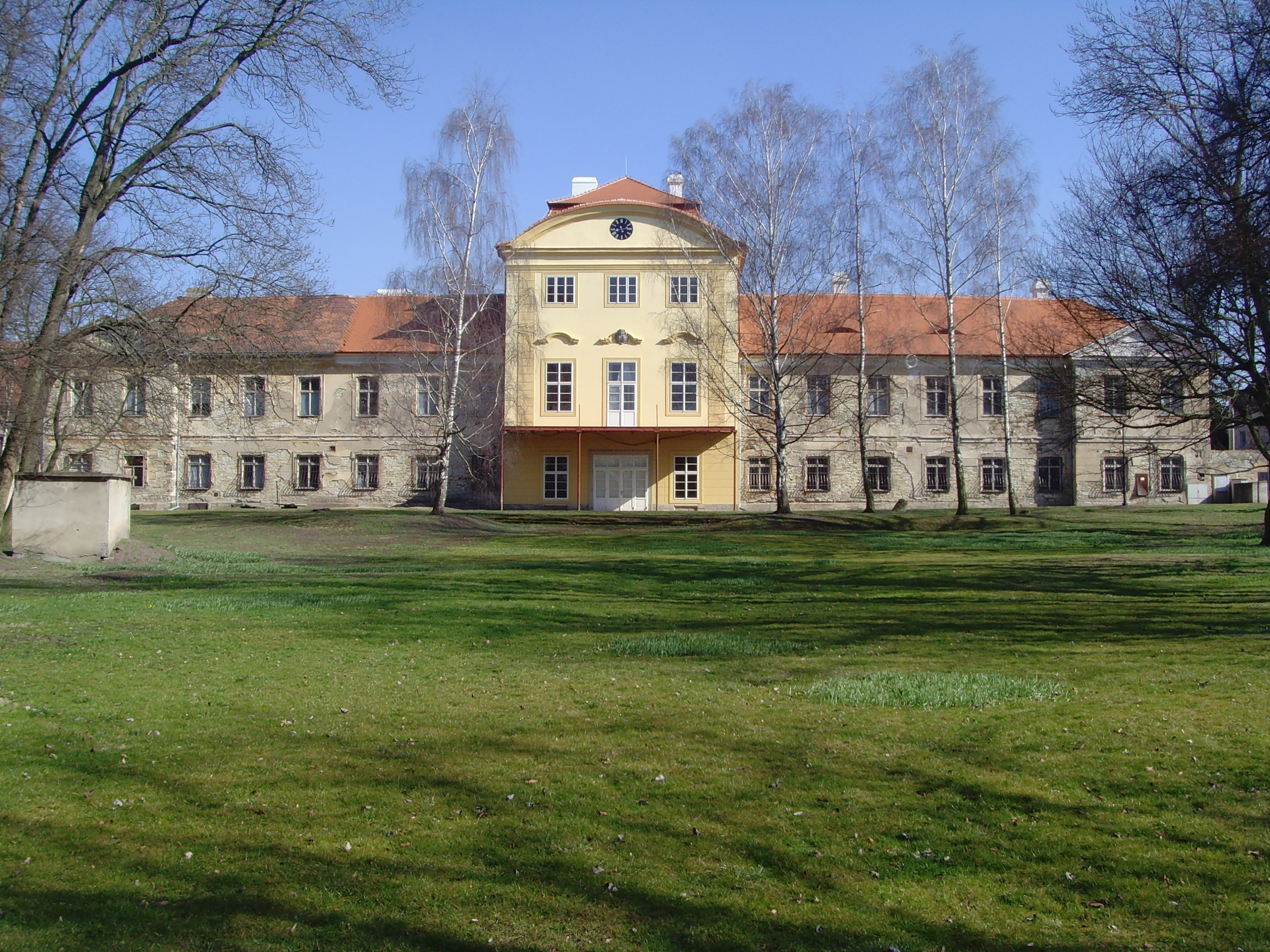 Pohled na zámek z parku.